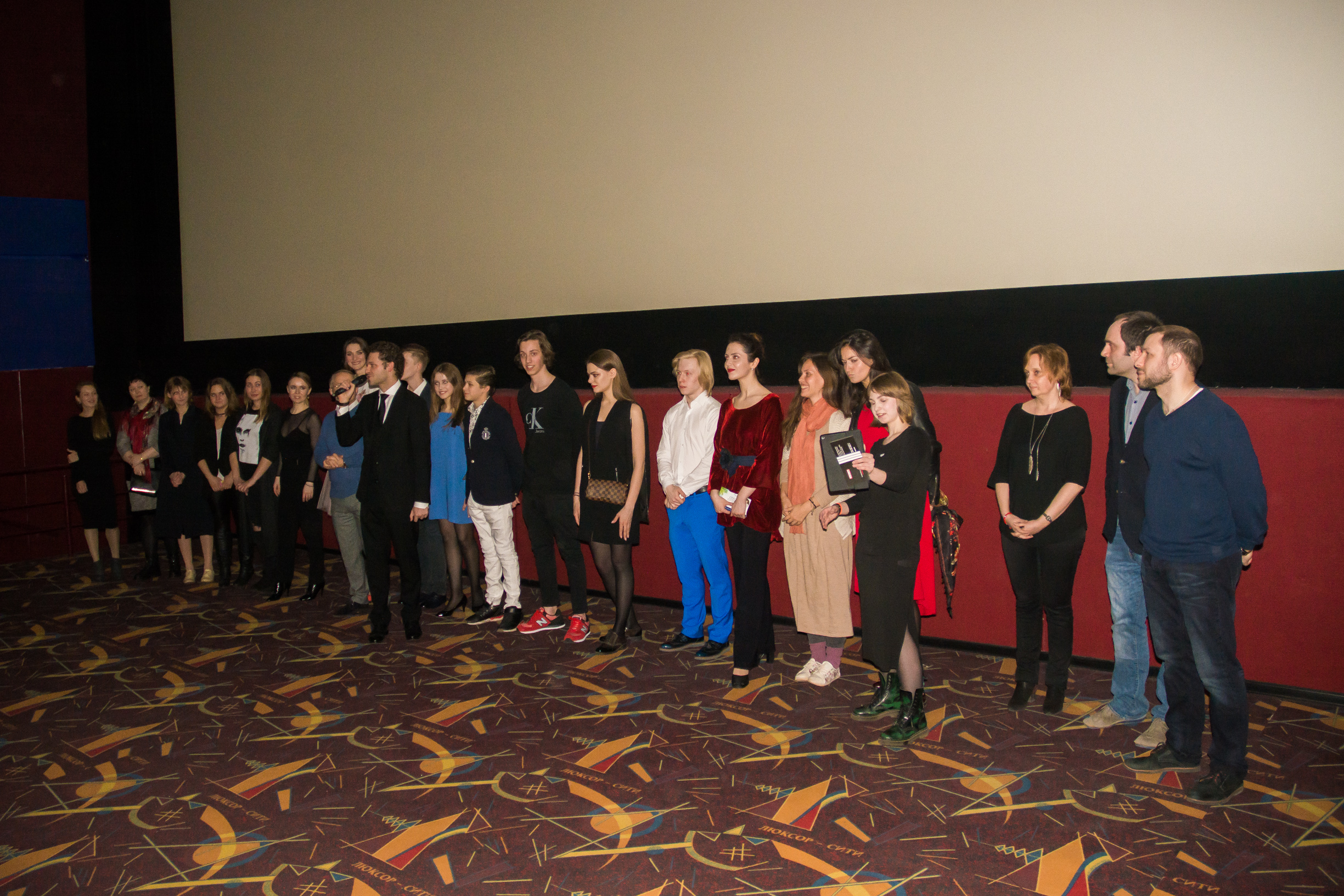 Актеры на премьере фильма «Спасти Пушкина»